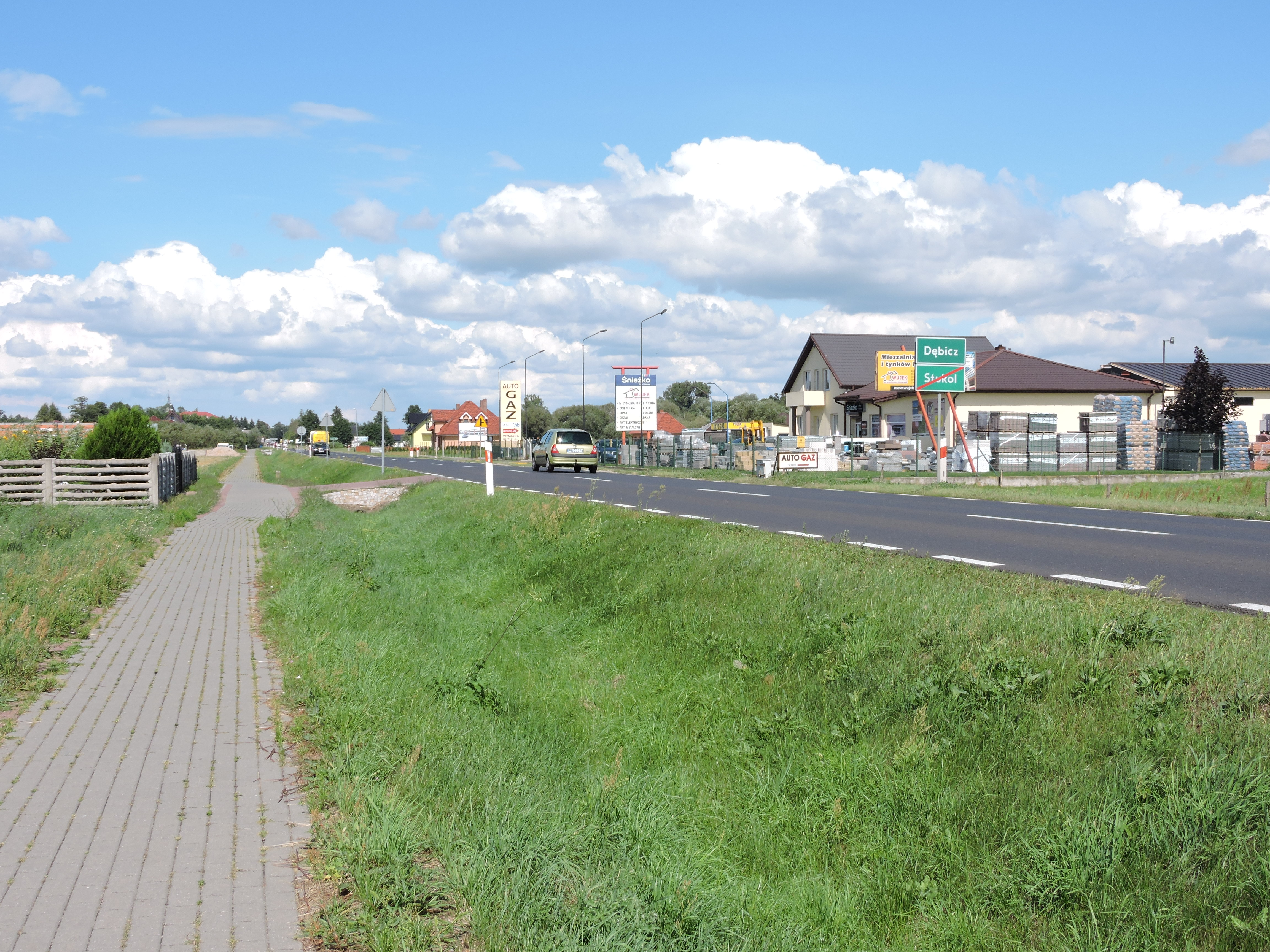 Dębicz (sierpień 2016)